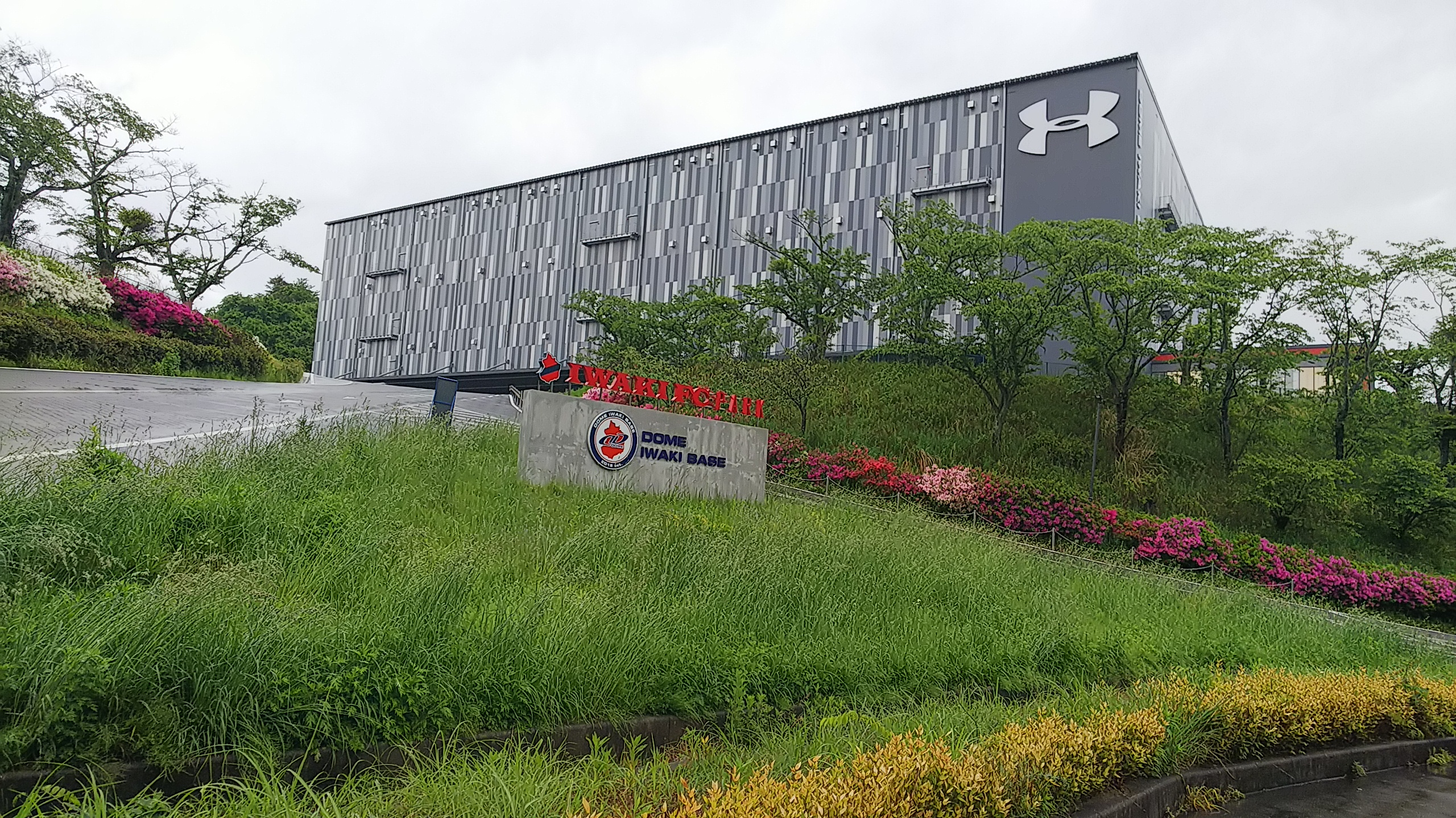 いわきドームベース。